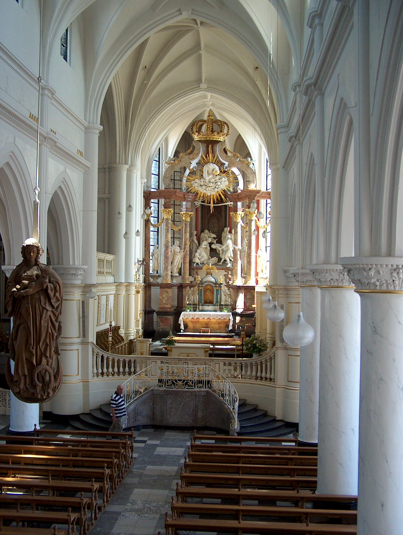 Abdijkerk Thorn